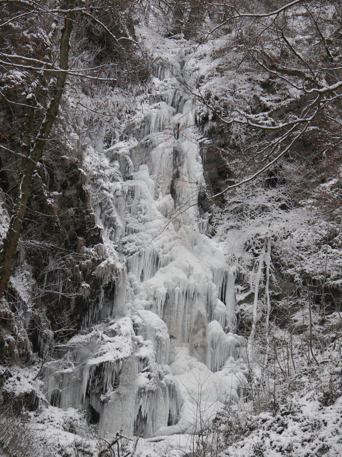 Plästerlegge komplett eingefroren